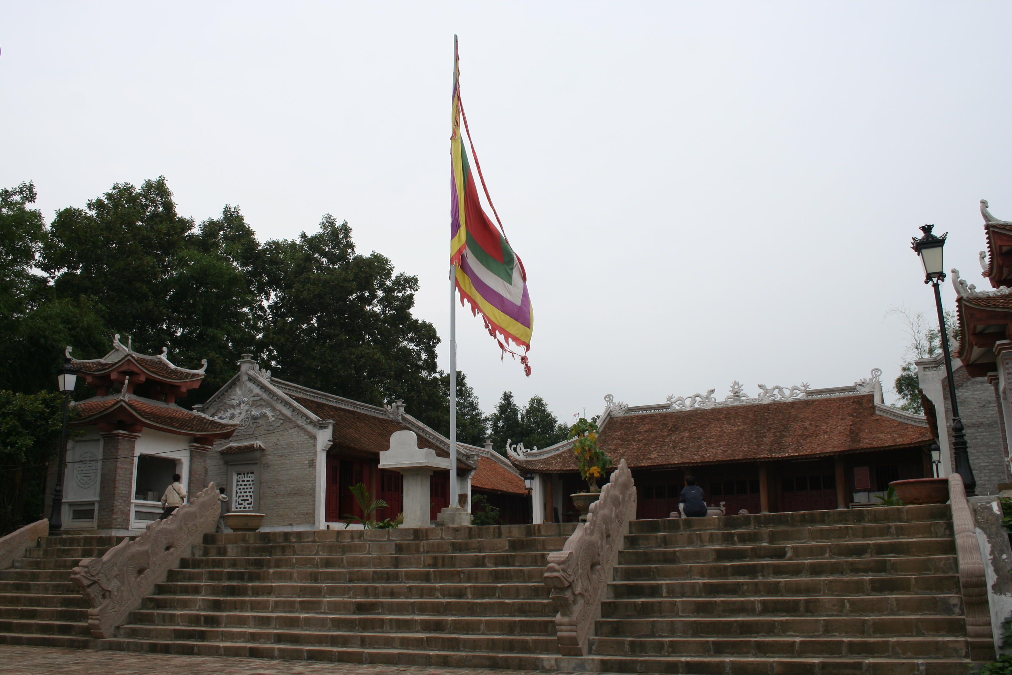 Sân trước chính điện đền Phúc Khánh, được xây trên nền cũ của thành cổ Nghị Lang, thị trấn Phố Ràng (Bảo Yên, Lào Cai)